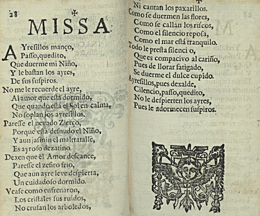 Letra do vilhancico Ayresillos manços por António Marques Lésbio. Foi cantado na festa do Natal do ano de 1681 na Capela Real do príncipe D. Pedro, futuro Pedro II de Portugal. É uma das poucas composições do compositor que chegaram aos nossos dias acompanhadas da respectiva música.